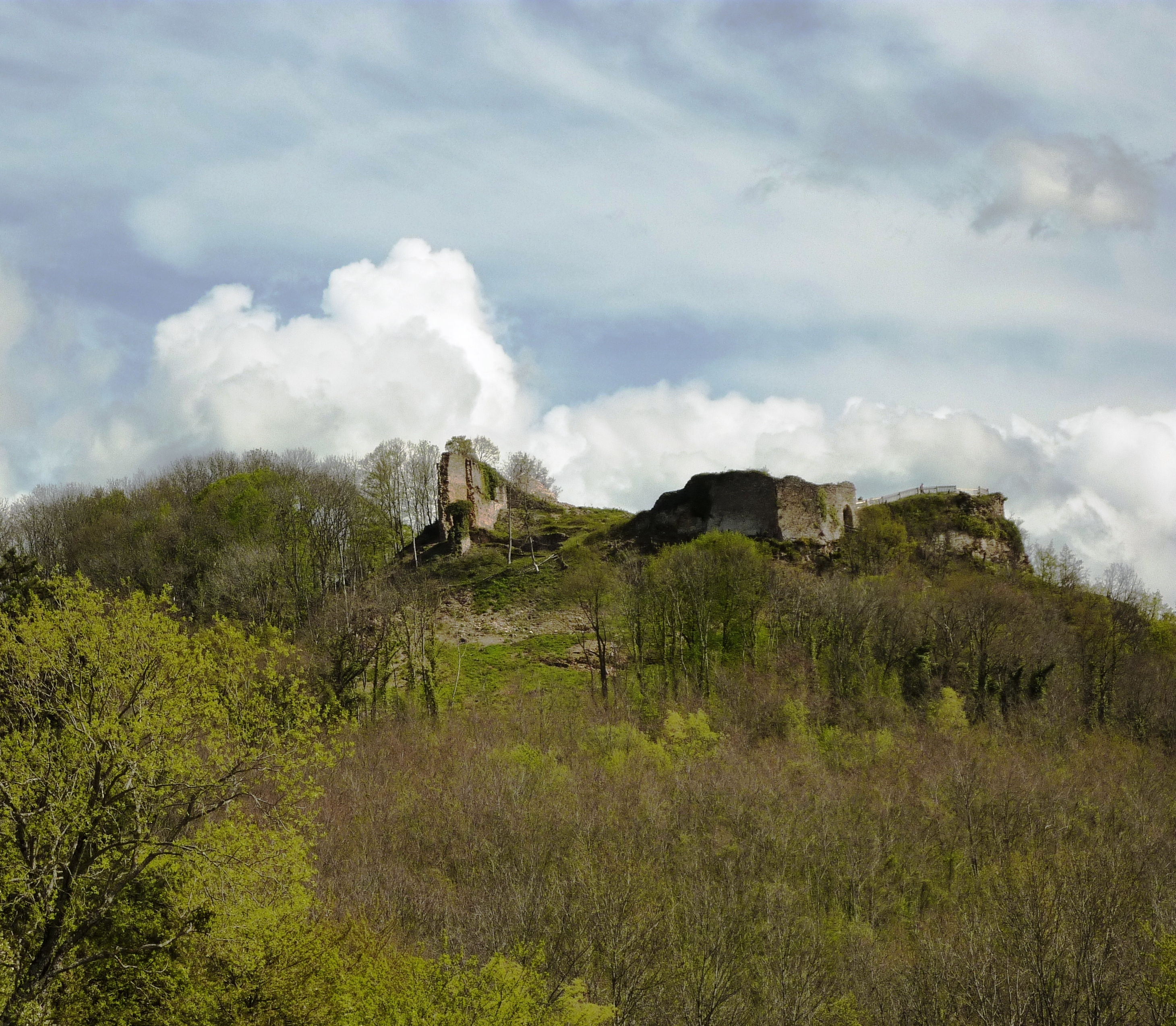 Les vestiges du grand mur et de la haute-cour du château de Saint-Germain